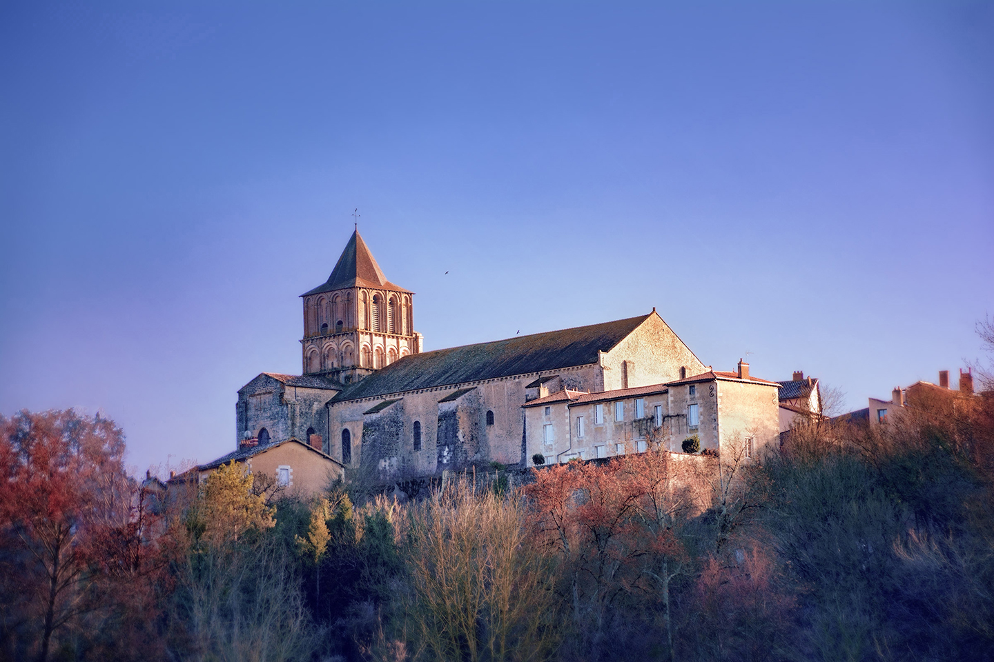 Église Notre Dame et Saint-Junien de Lusignan vu de la Vonne Face exposed .